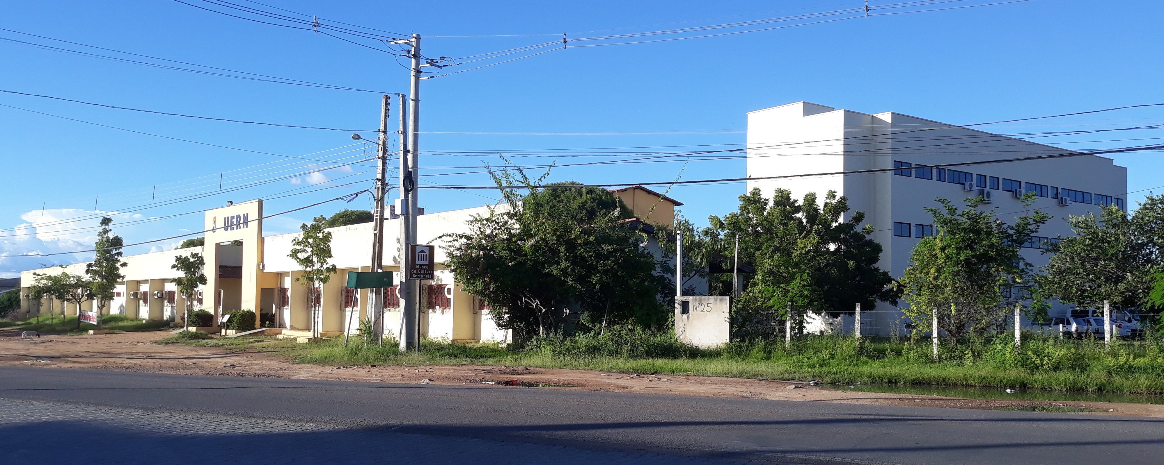 Câmpus Avançado Professora Maria Elisa de Albuquerque Maia, da Universidade do Estado do Rio Grande do Norte (UERN), em Pau dos Ferros, Brasil